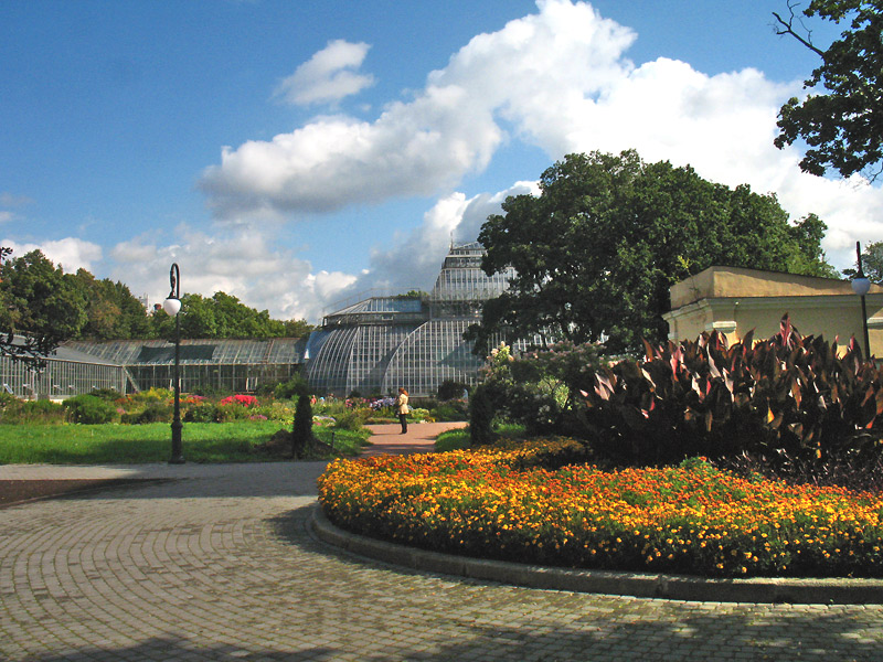 Ботанический сад РАН, лето 2010, оранжереи и цветник